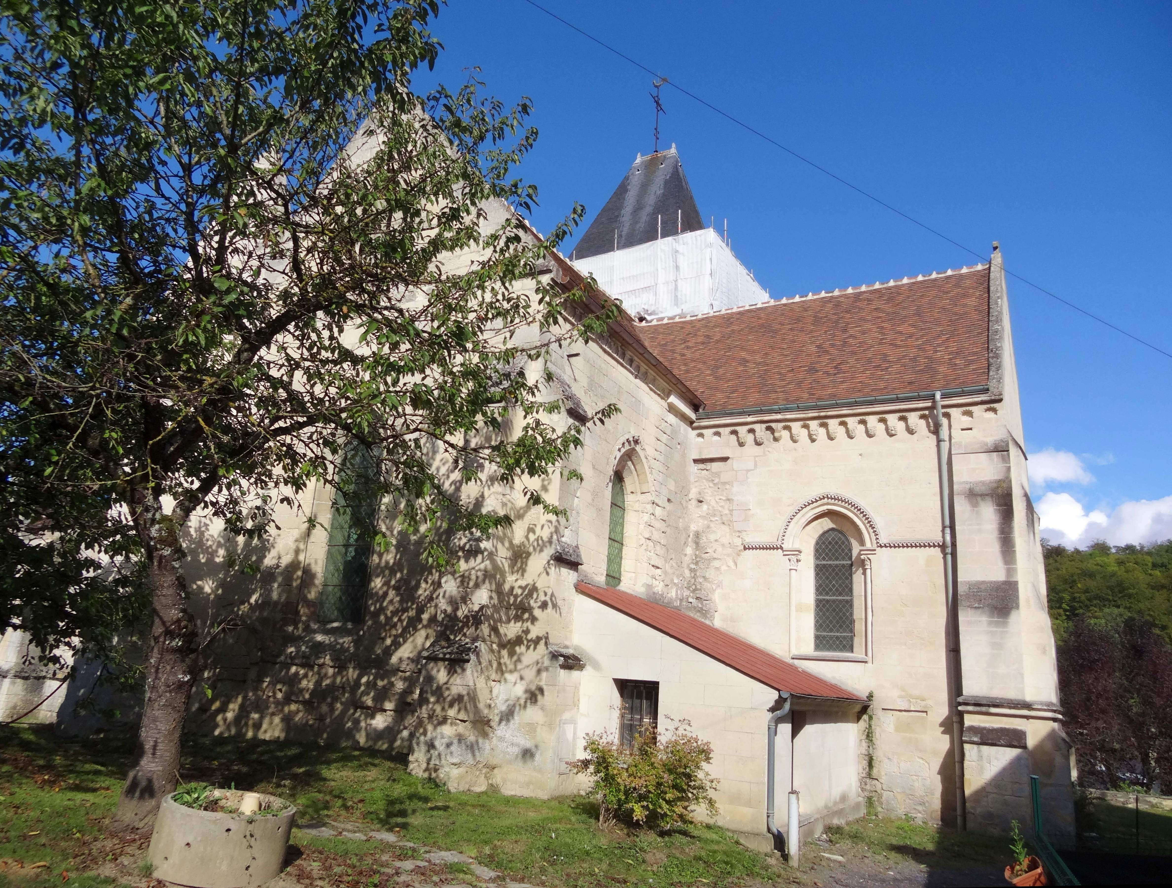 Église Saint-Martin de Bonneuil-en-Valois - voir titre.